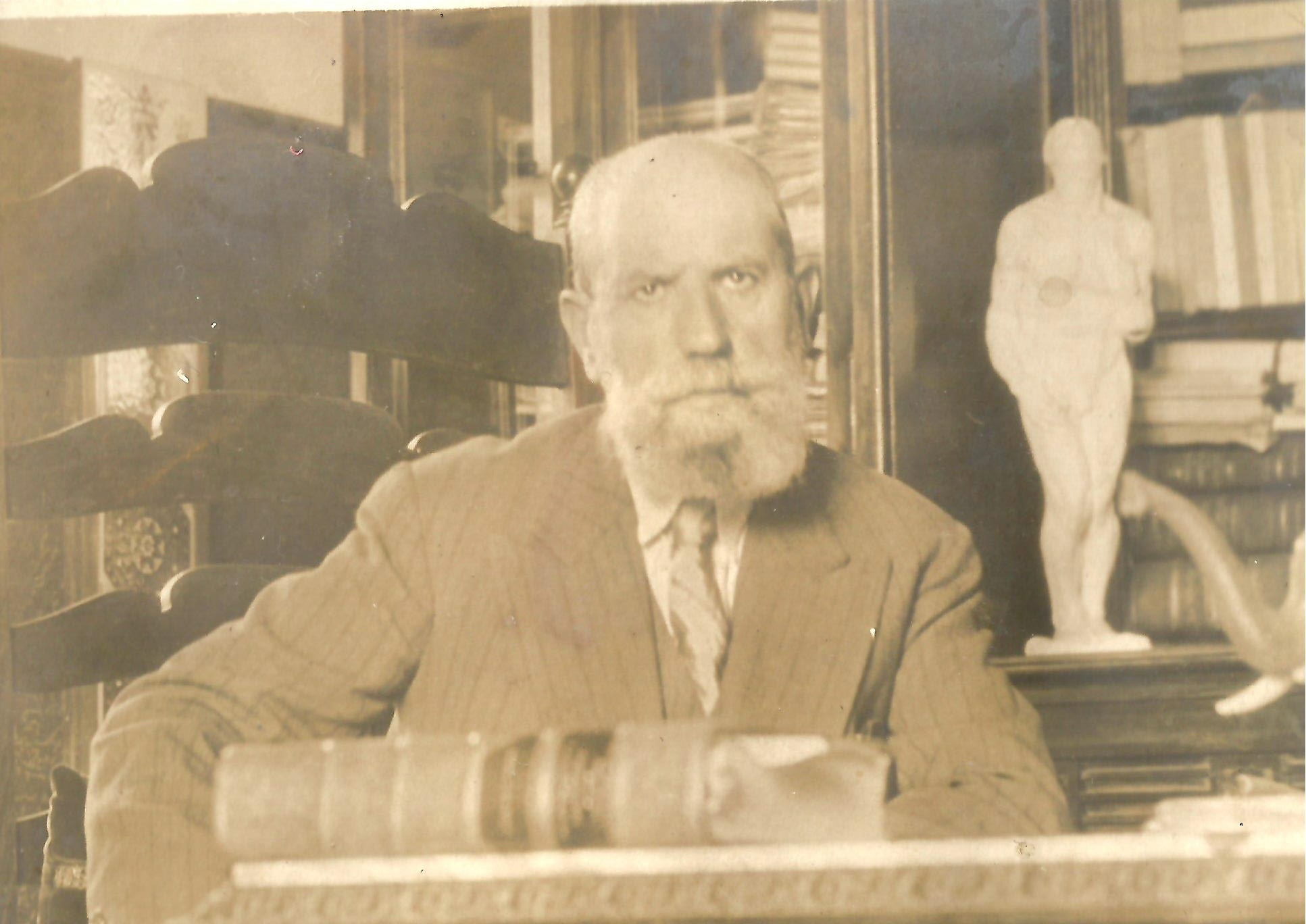 El poeta Vicente Medina y en segudno plano el modelo en miniatura de Ansias de Luz del escultor Erminio Blotta